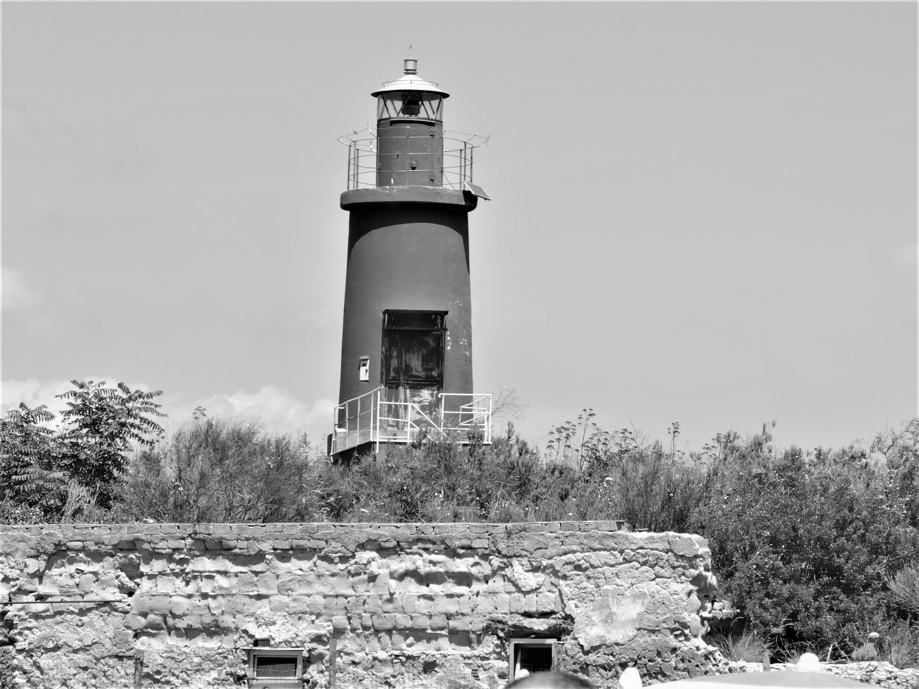 faro di Baia (Napoli). Autore foto: Roberto De Martino